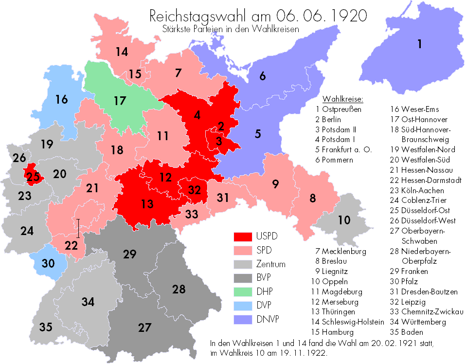 Ergebnisse der Reichstagswahl 1920 auf Wahlkreisebene. Datenquelle